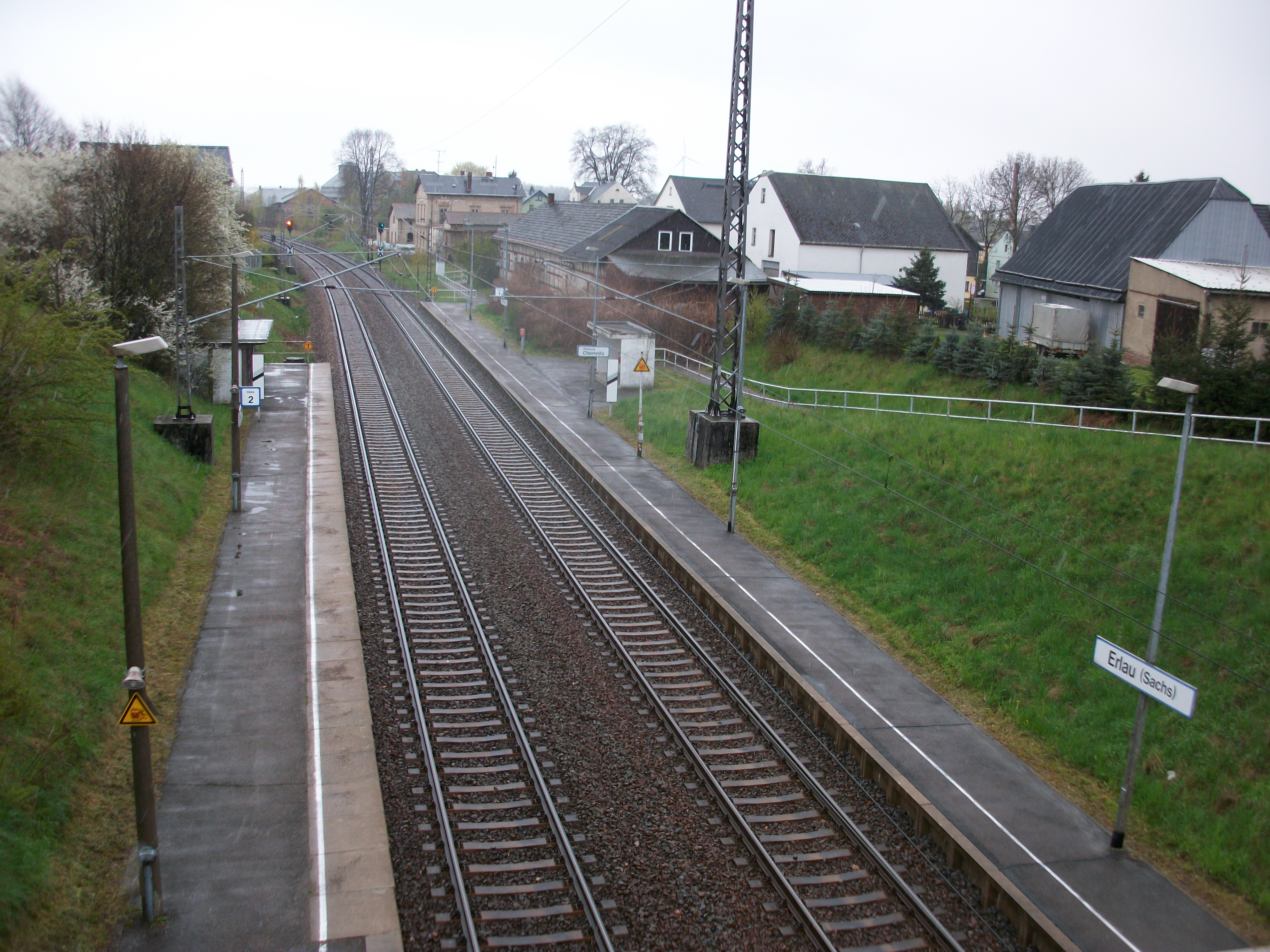 Bahnhof Erlau (Sachs) (2016)